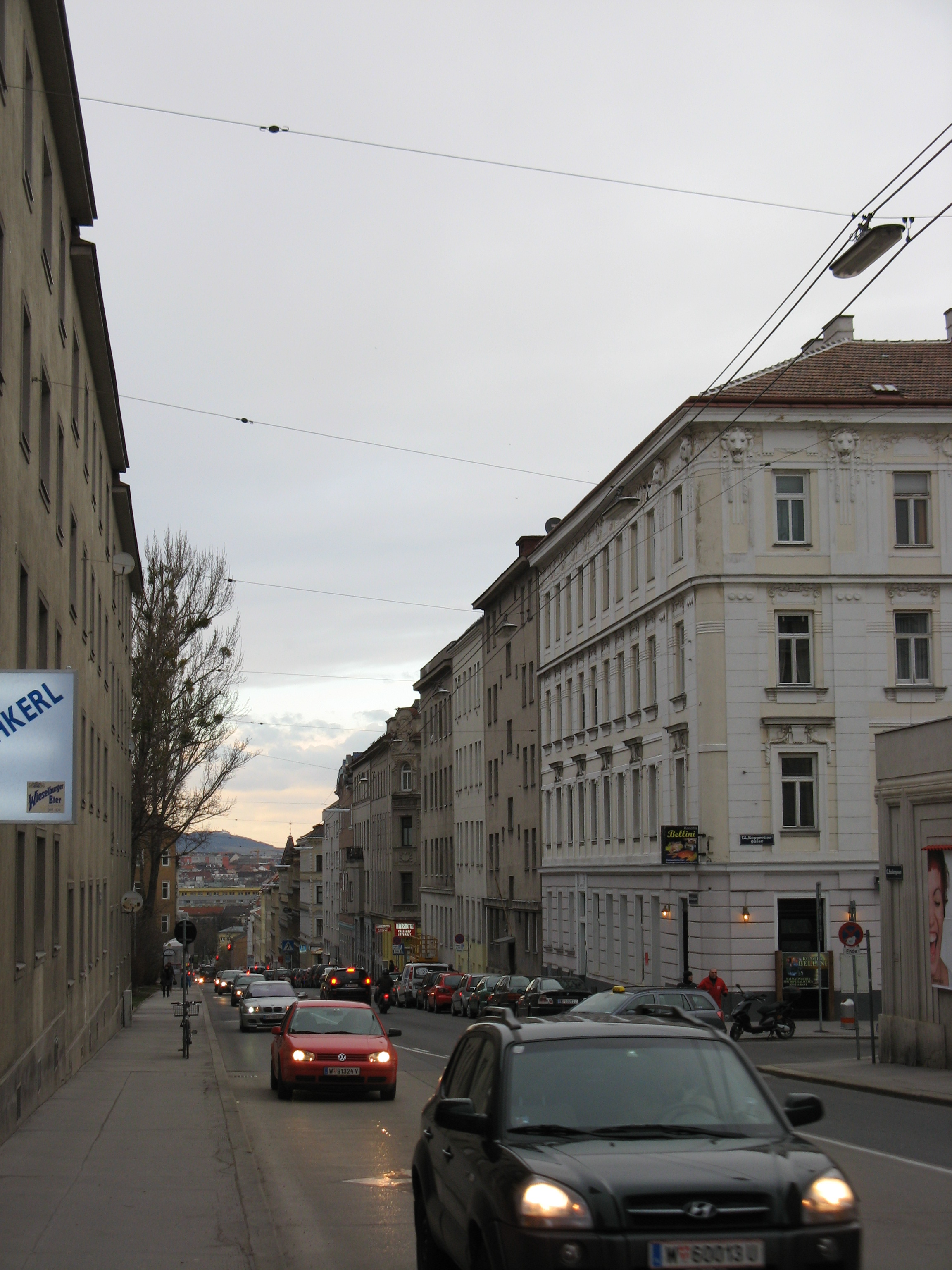 Ruckergasse, Wien-Meidling